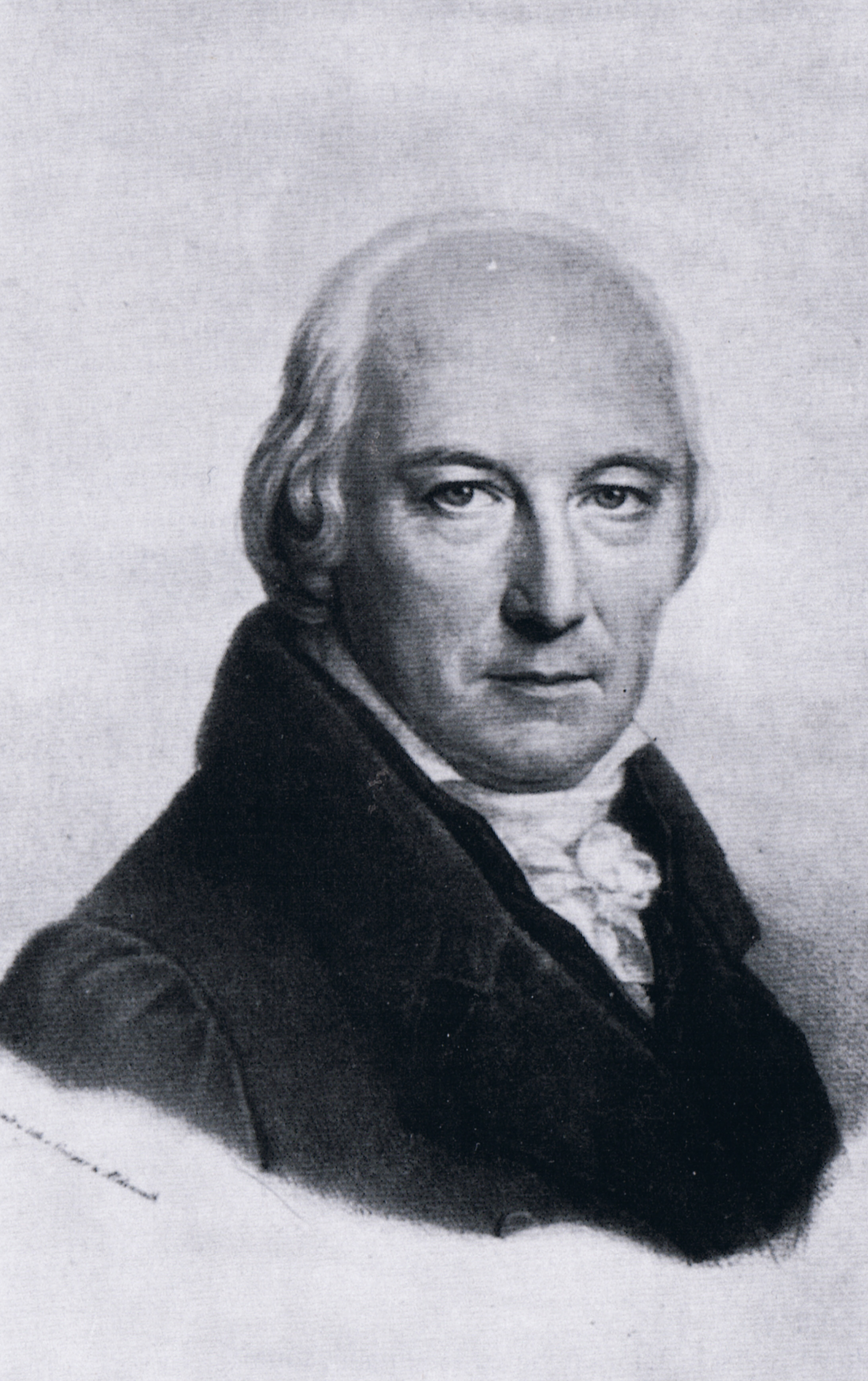 Friedrich Ludwig Schröder (* 3. November 1744 in Schwerin; † 3. September 1816 in Rellingen) war ein deutscher Schauspieler, Theaterdirektor und Dramatiker. Als Reformer der Freimaurerei begründete er ein eigenenes Ritualwerk, die sogenannte „Schrödersche Lehrart“, die noch heute von vielen Logen – auch außerhalb Deutschlands – gepflegt wird. Lithograpie von Friedrich Carl Gröger (1766-1838) und Heinrich Jacob Aldenrath (1775-1844)